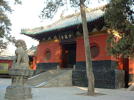 Bir şaolin tapınağından görüntü.